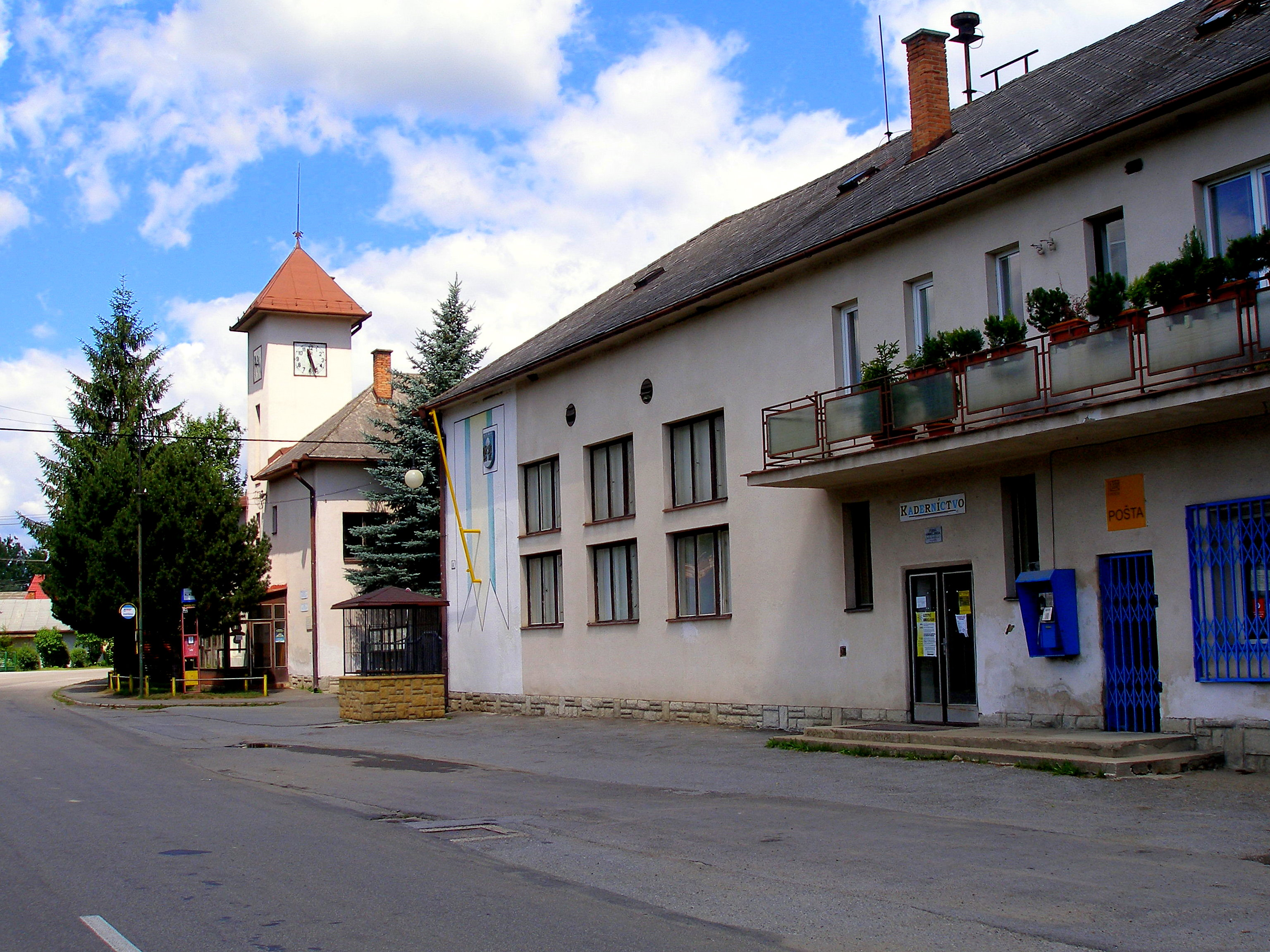 Šarišská vrchovina, obec Bzenov v okrese Prešov, región Šariš